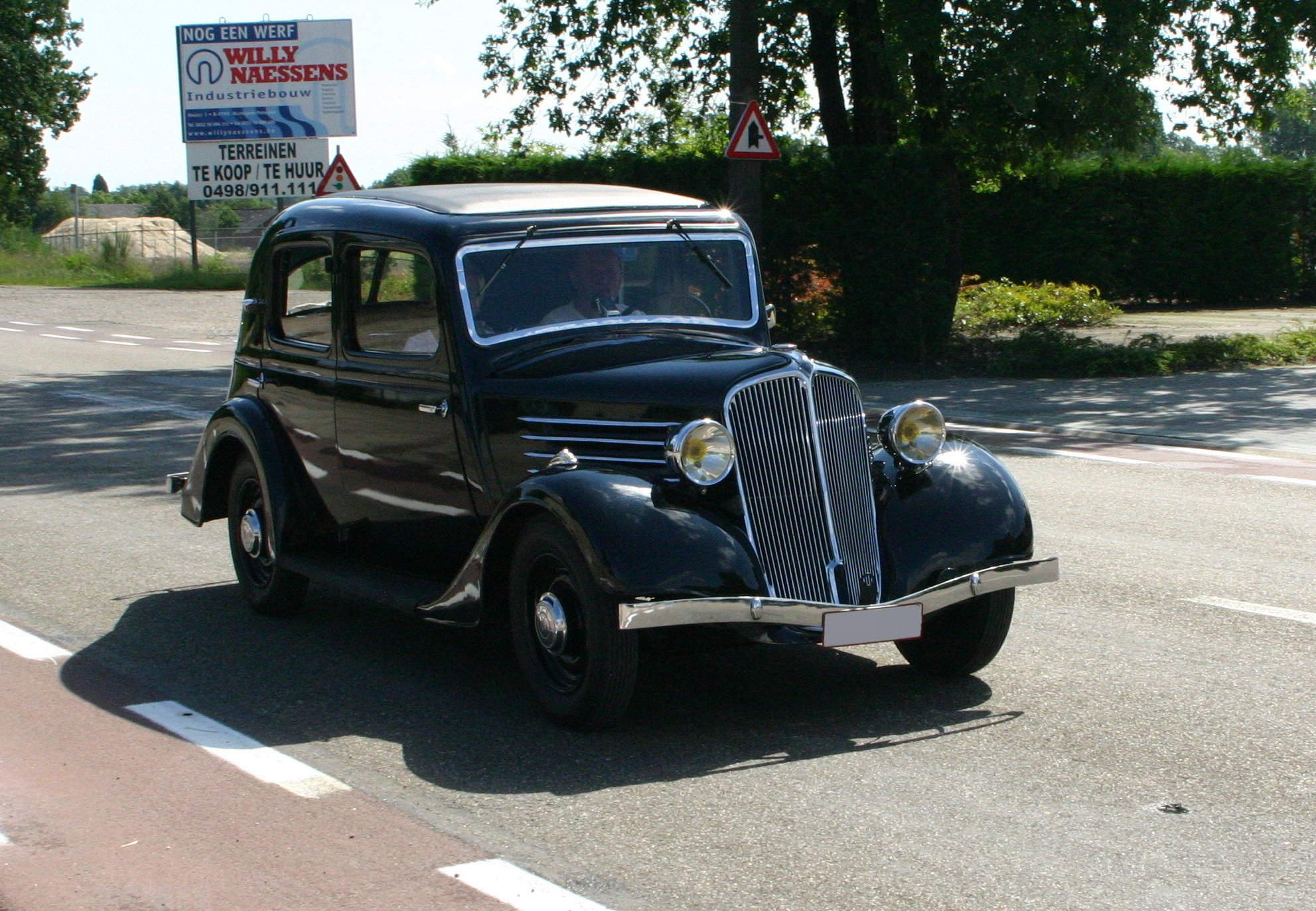 Renault Celtaquatre. Kategorie:Renault